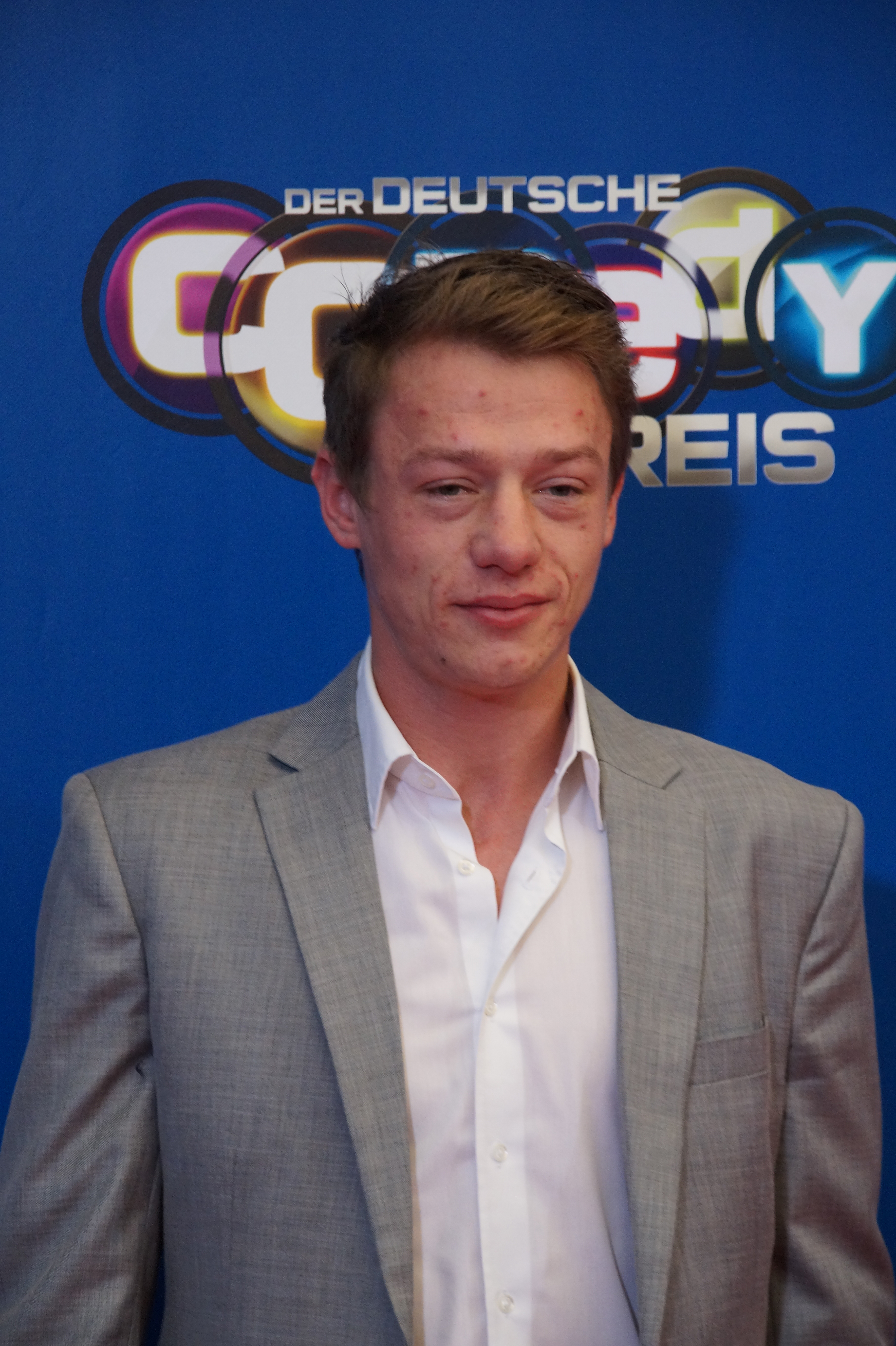 Vincent Krüger beim Comedypreis 2016, Oktober, Köln.